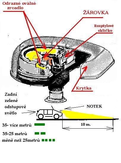 Schéma odstupový Notek